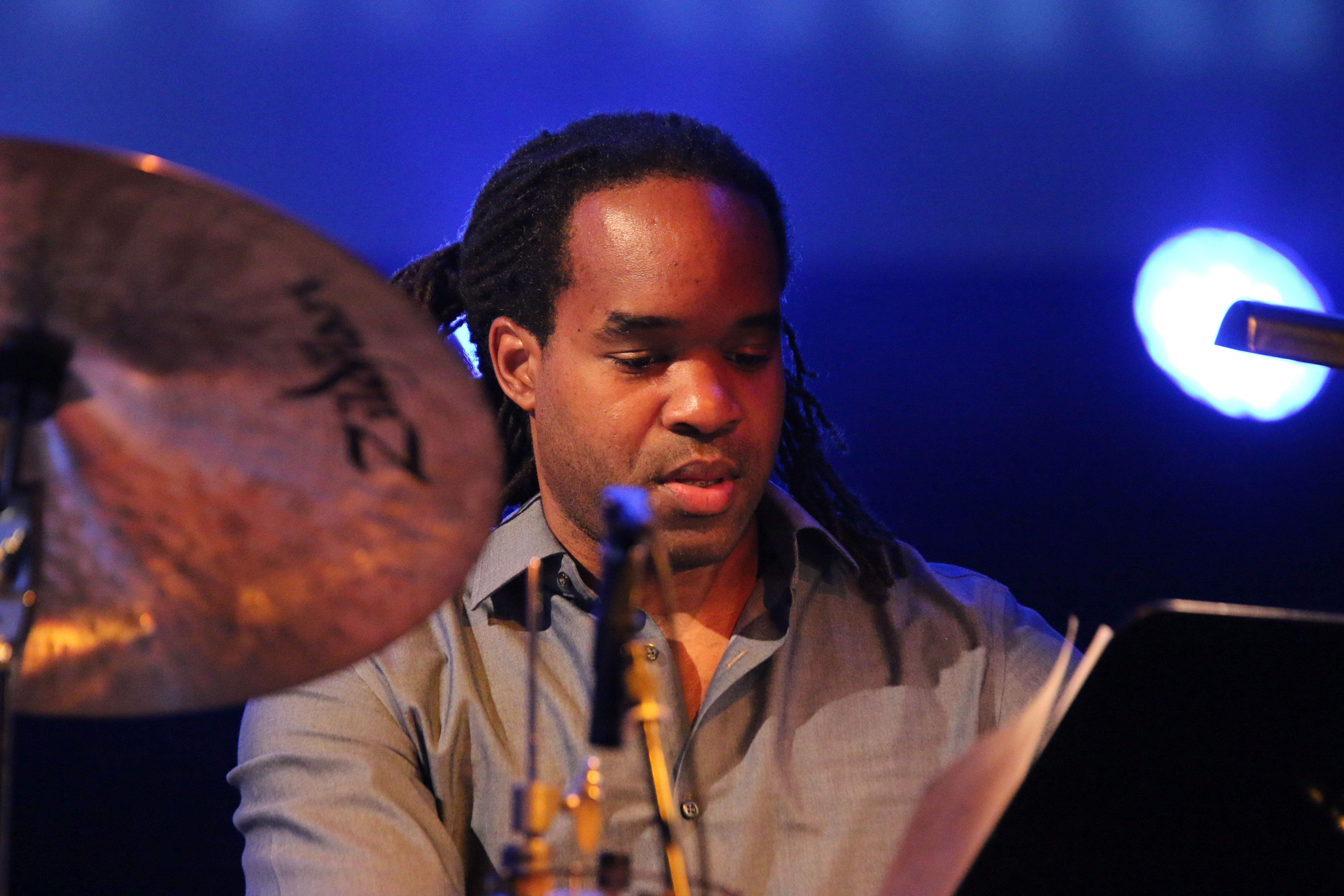 46. Deutsches Jazzfestival Frankfurt 2015: Mark Turner Quartett: Obed Calvaire